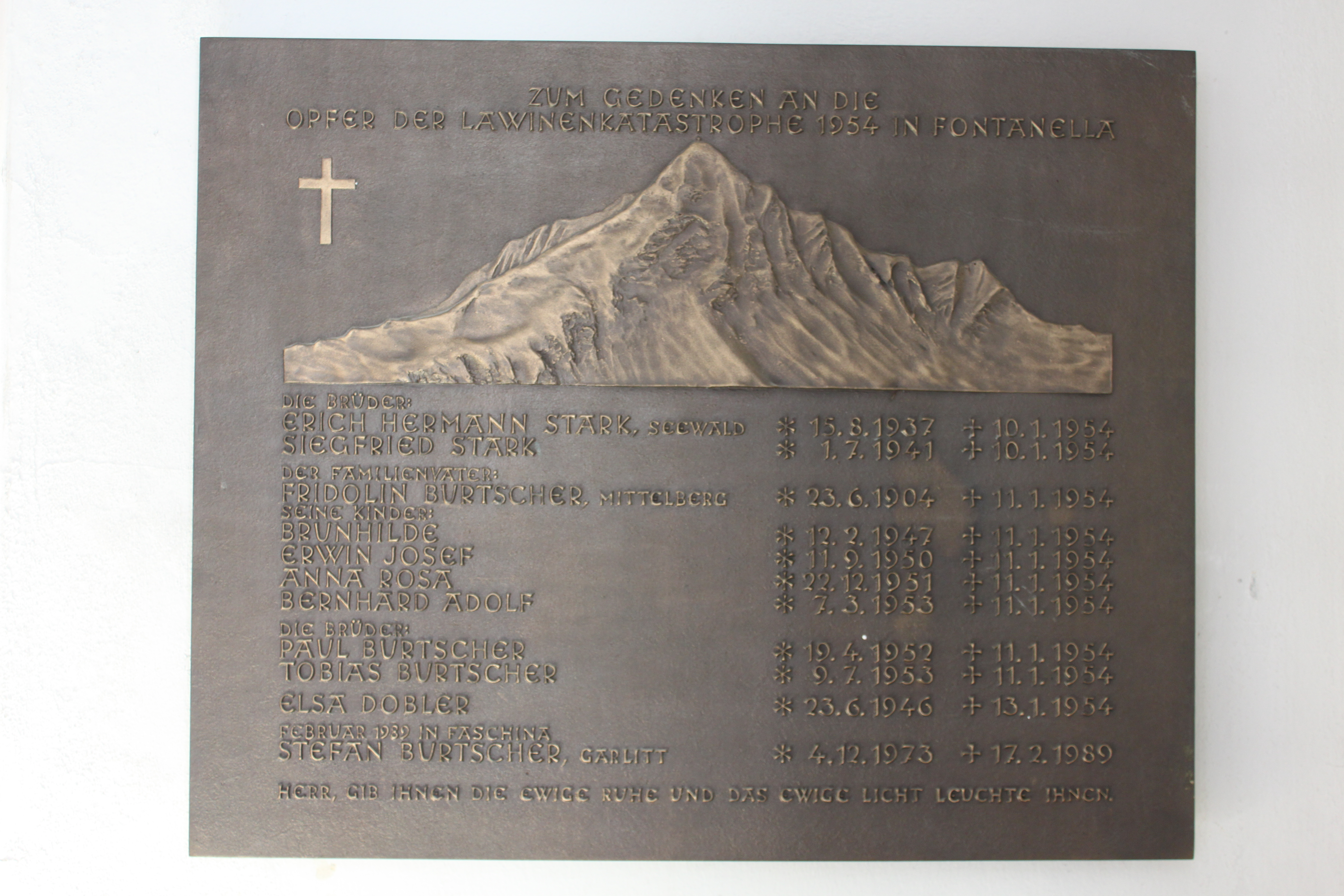 Pfarrkirche hl. Sebastian, in Fontanella, Gedenktafel an Lawinenopfer des Ortes